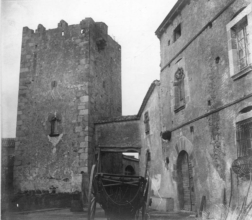 Part de la façana, portal i torre de Can Amat, un carro en primer terme. Cèsar August Torras i Ferreri (Entre 1890 i 1923)